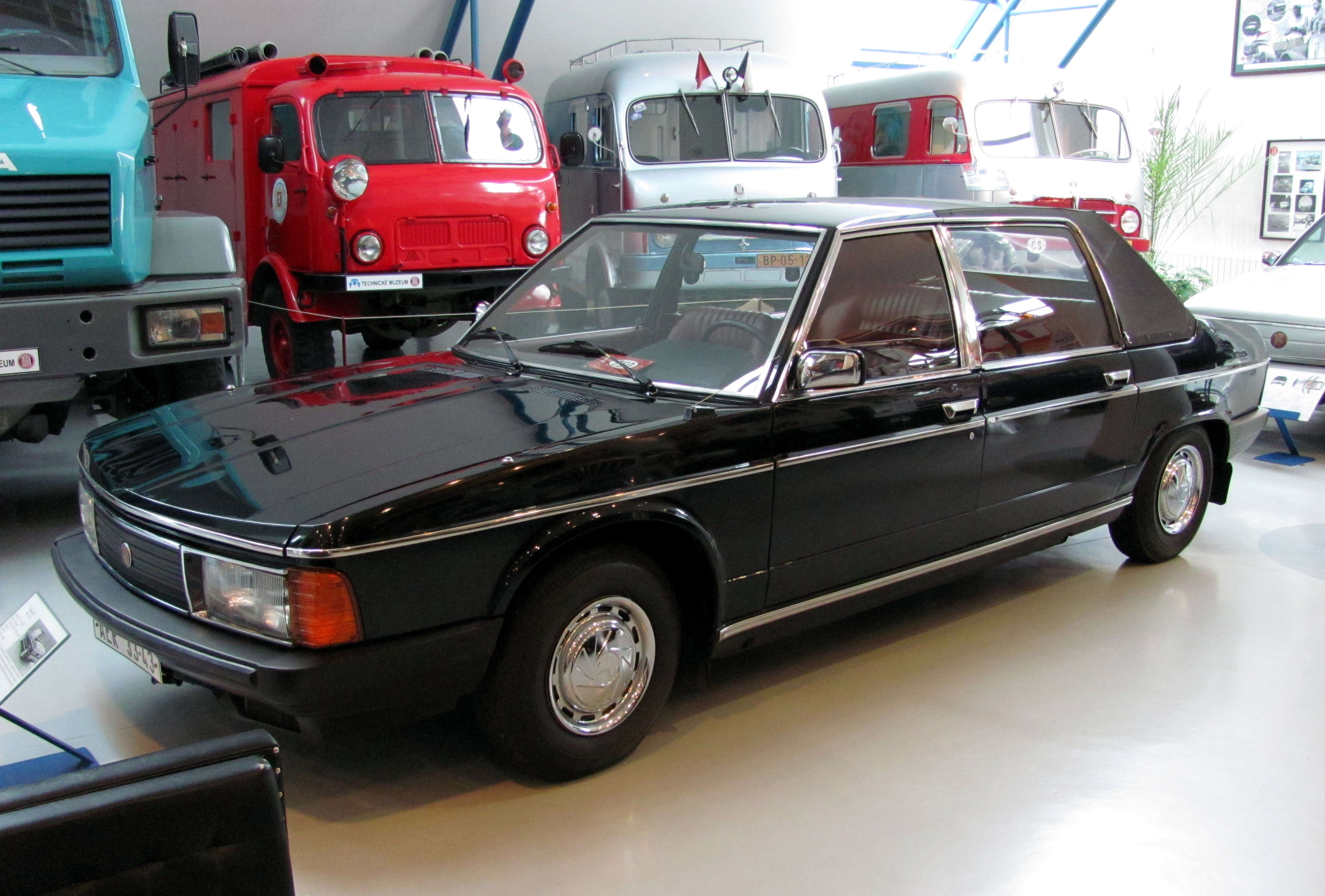 Tatra 613 kabriolet